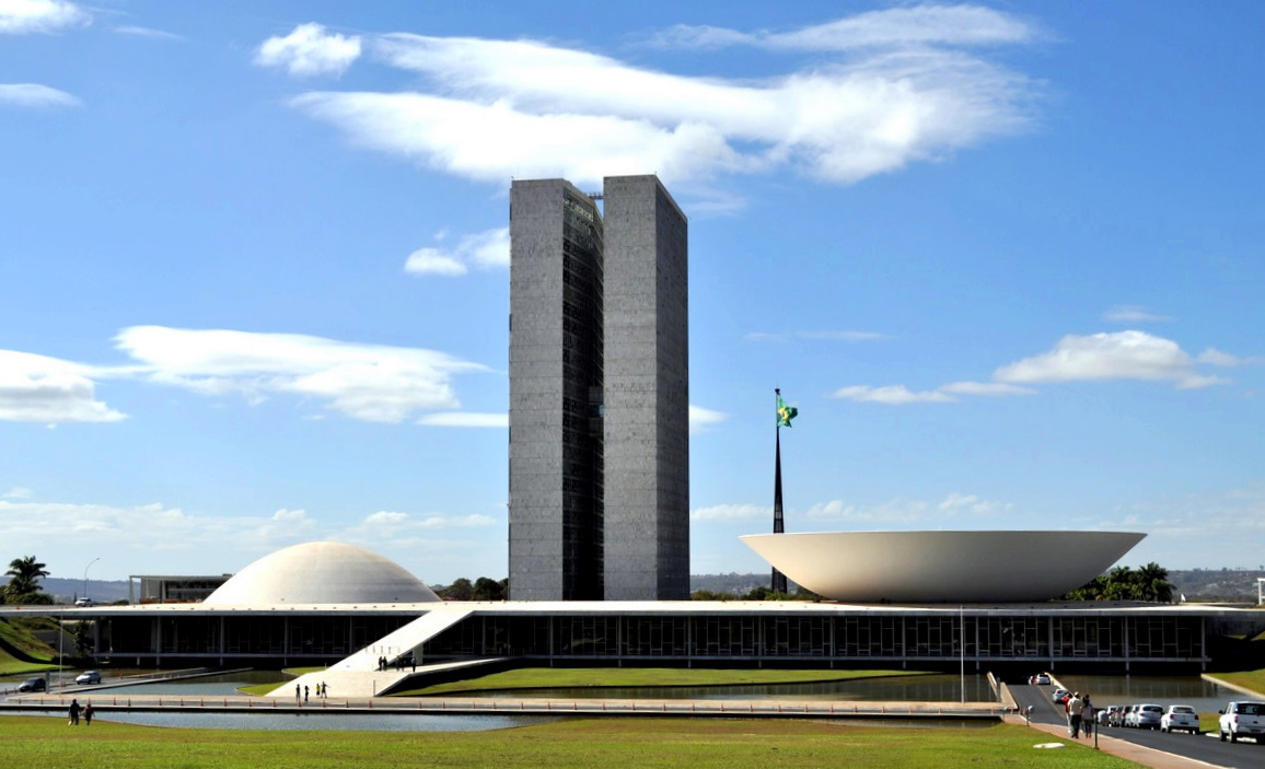 Congresso Nacional do Brasil, Brasília. License on Flickr (2010-12-27): CC-BY-2.0 Flickr tags: Thiago Melo, Brasília, Congresso Nacional